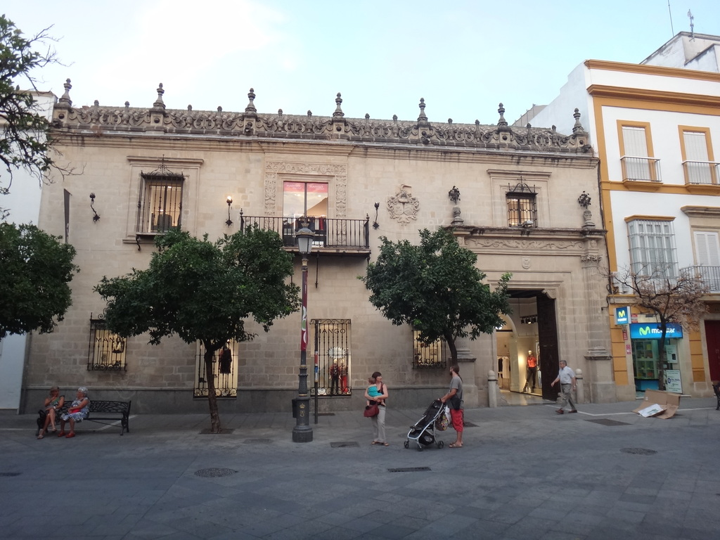 Frontal del Palacio del Marqués de Villamarta. Jerez de la Frontera (Andalucía, España)